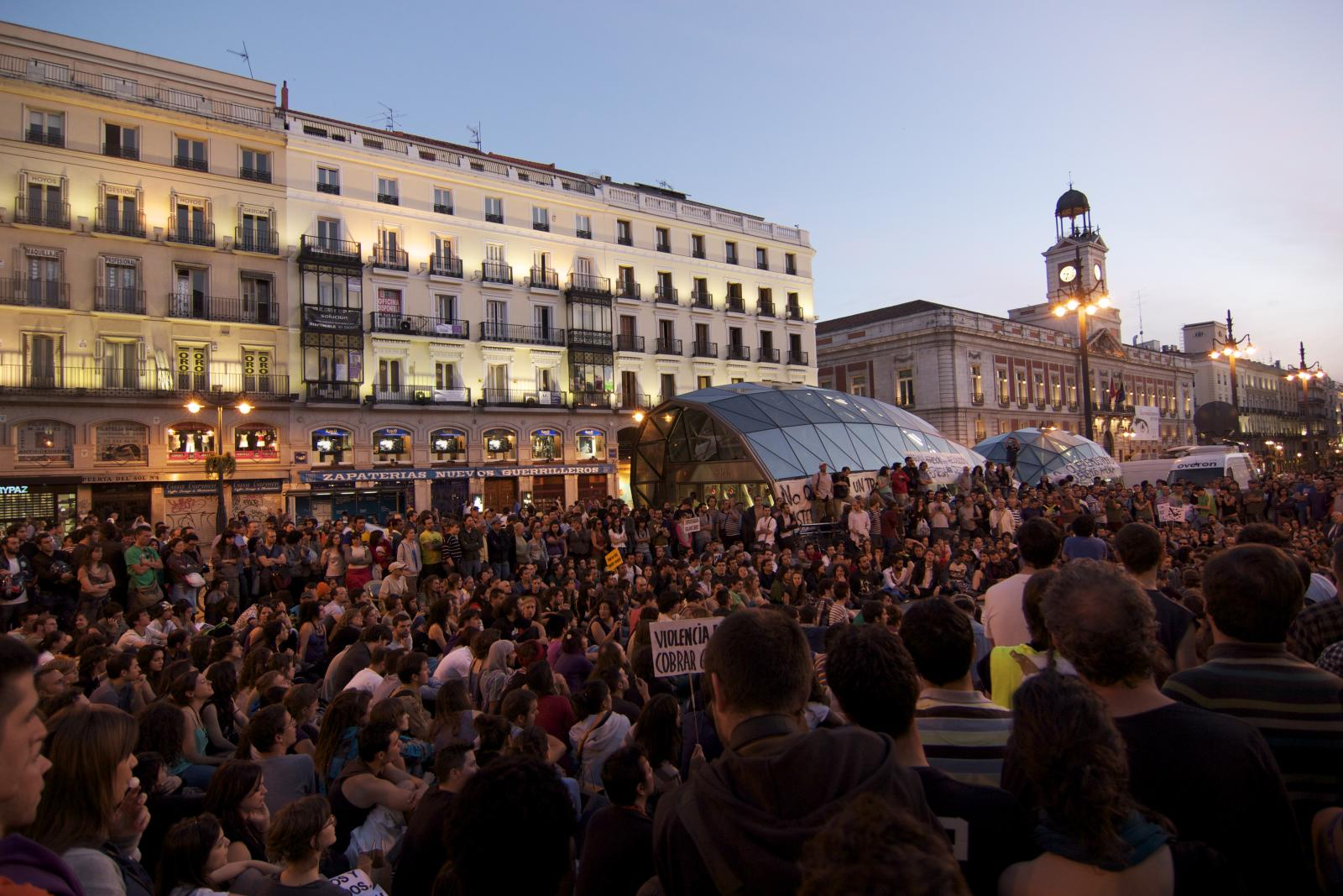 Manifestación de Democracia Real Ya en Madrid el 16 de mayo de 2011.